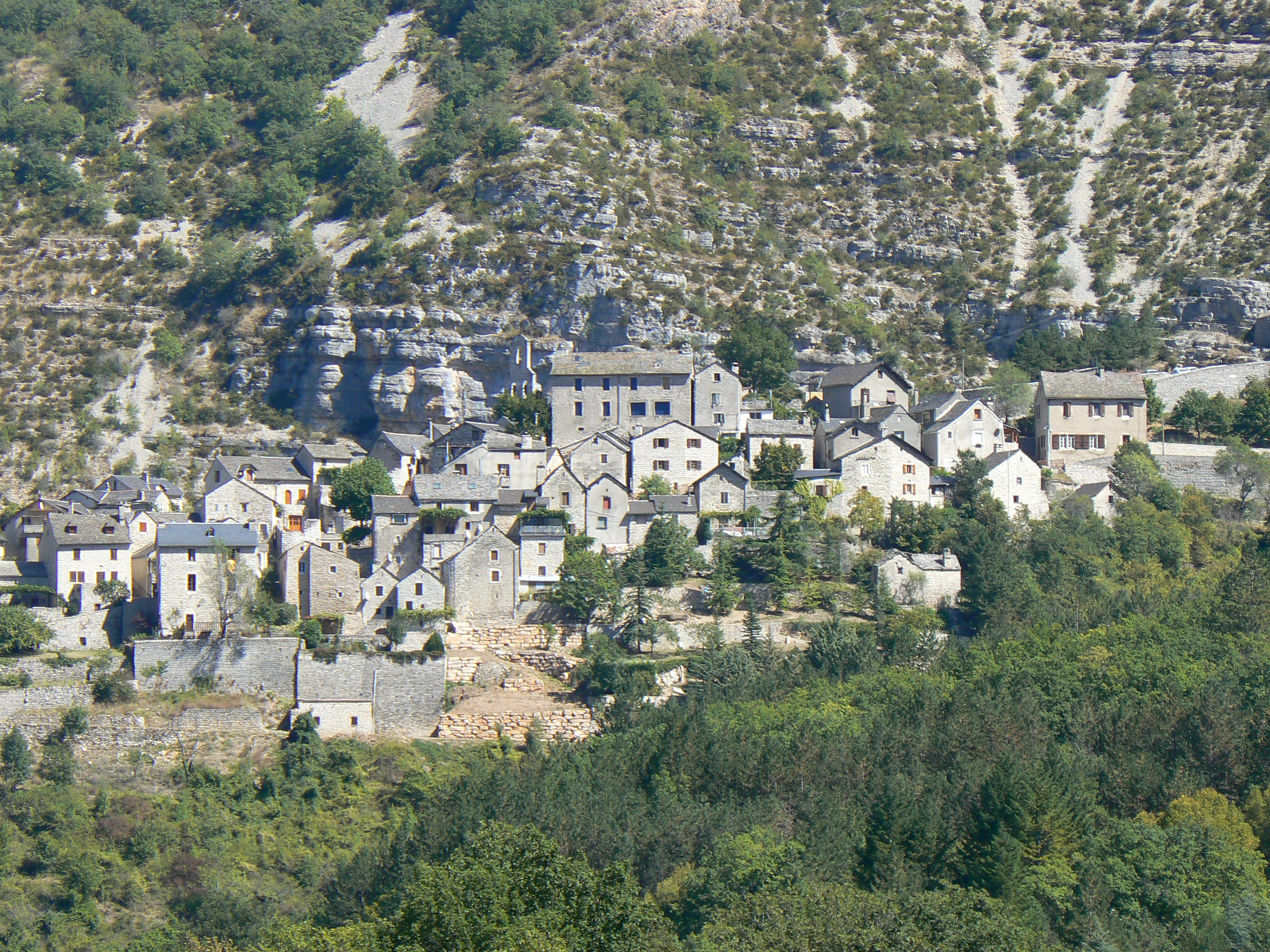 Vue générale de la commune de Montbrun en Lozère (Languedoc-Roussillon, France).